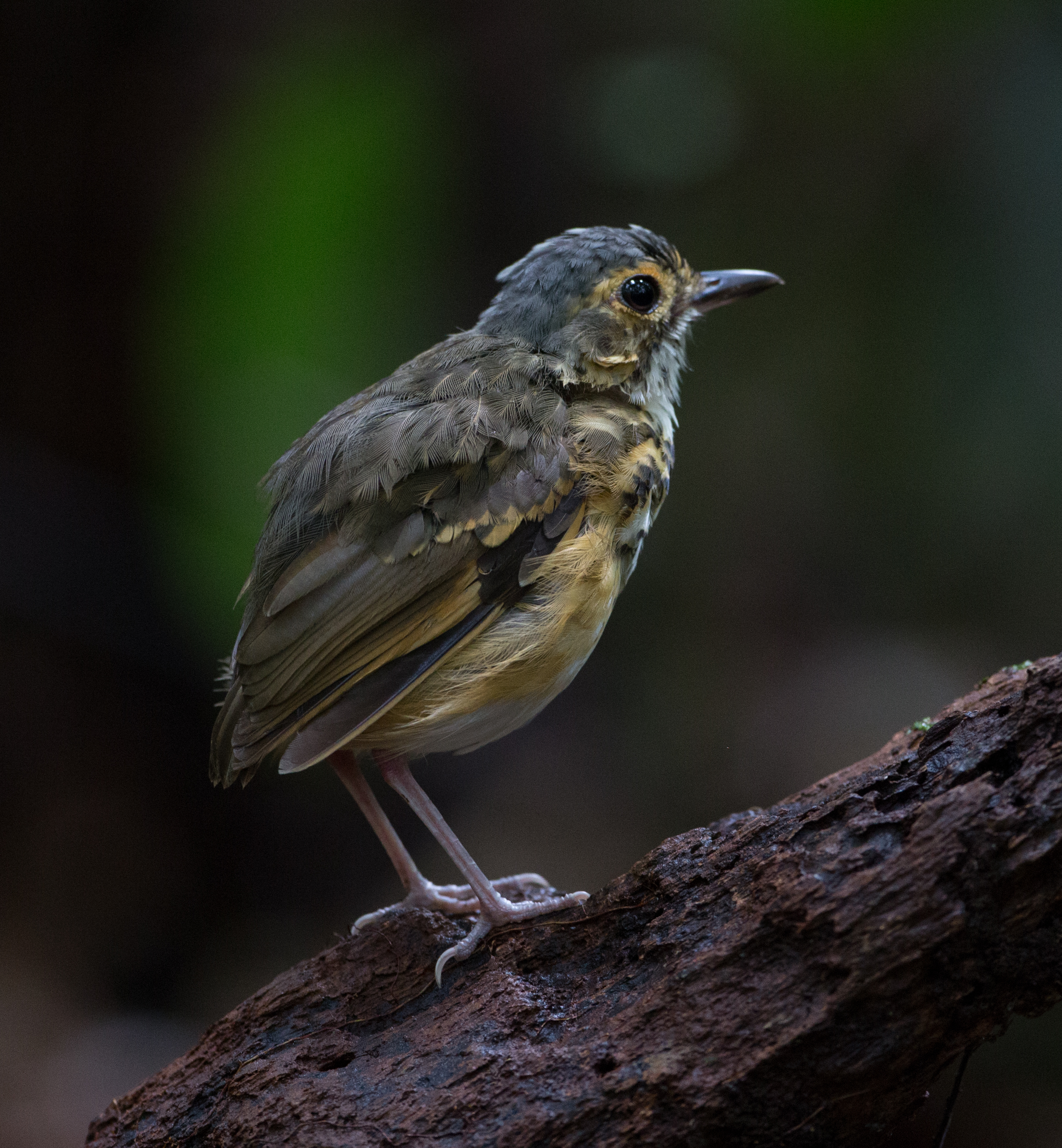 Torom-carijó (Hylopezus macularius)